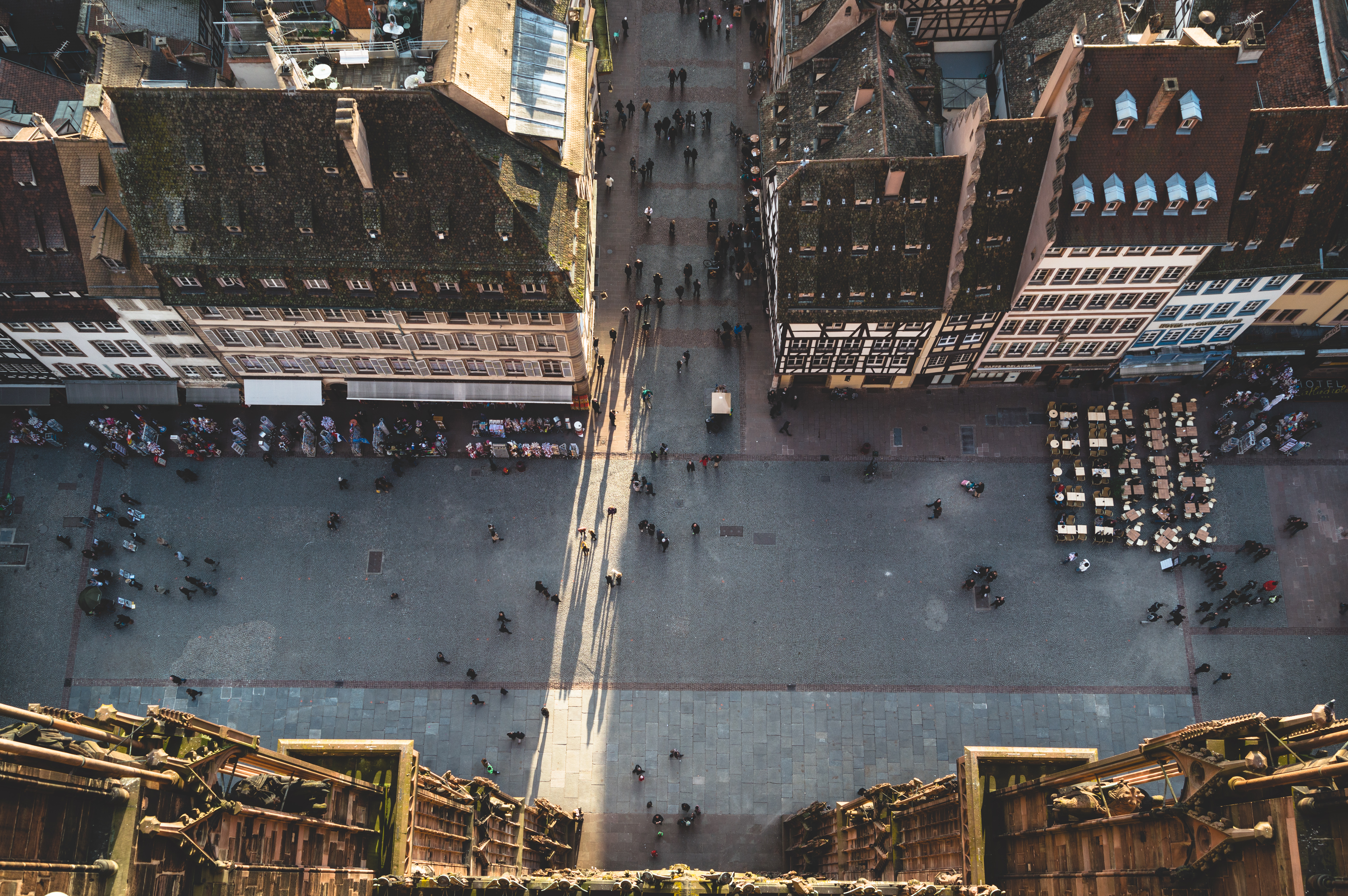 Vue du parvis de la cathédrale Notre-Dame de Strasbourg. Prise depuis la plate-forme principale, le 2 mars 2014 à Strasbourg, France.